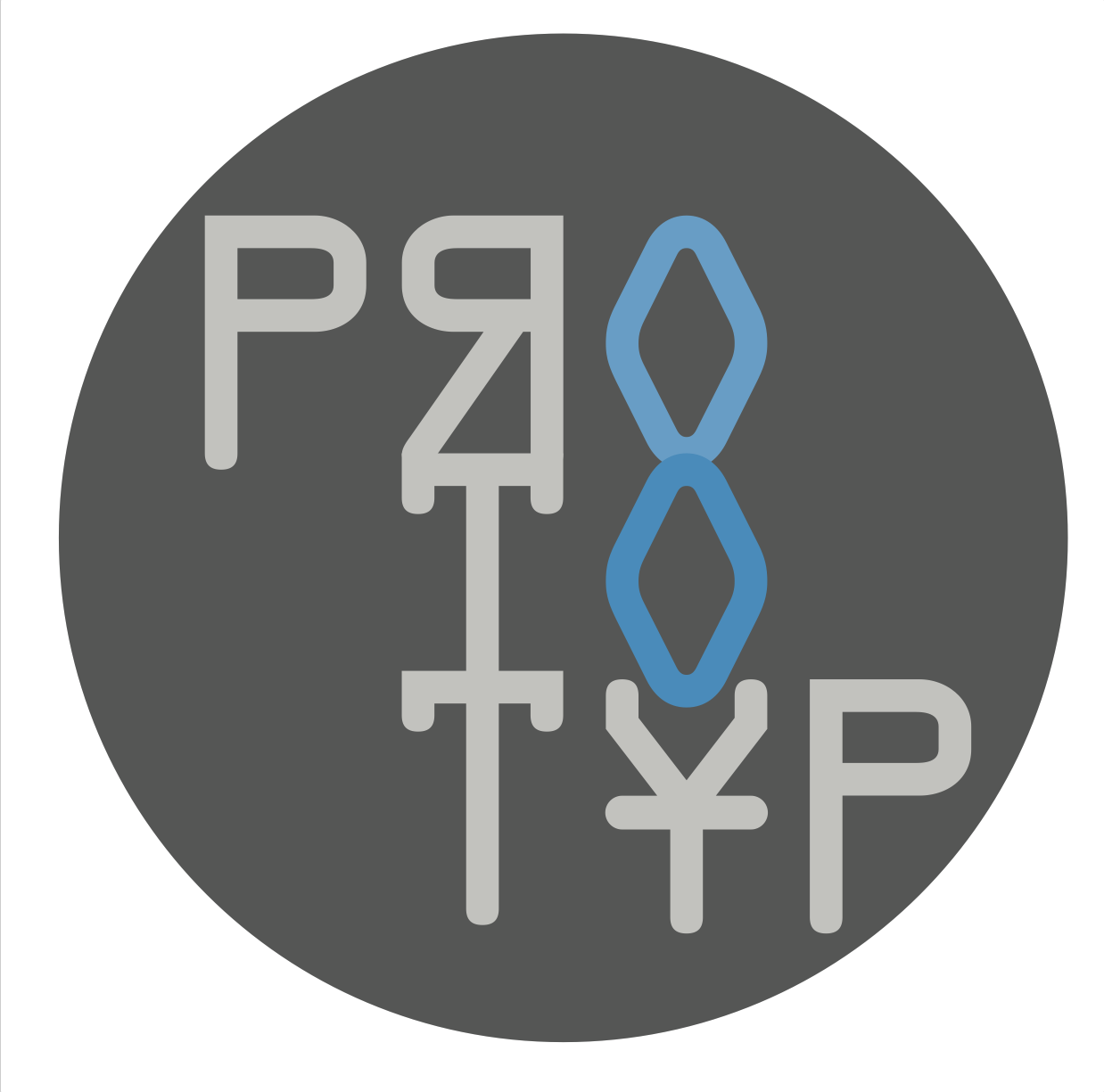 Oficiální logo festivalu Prototyp